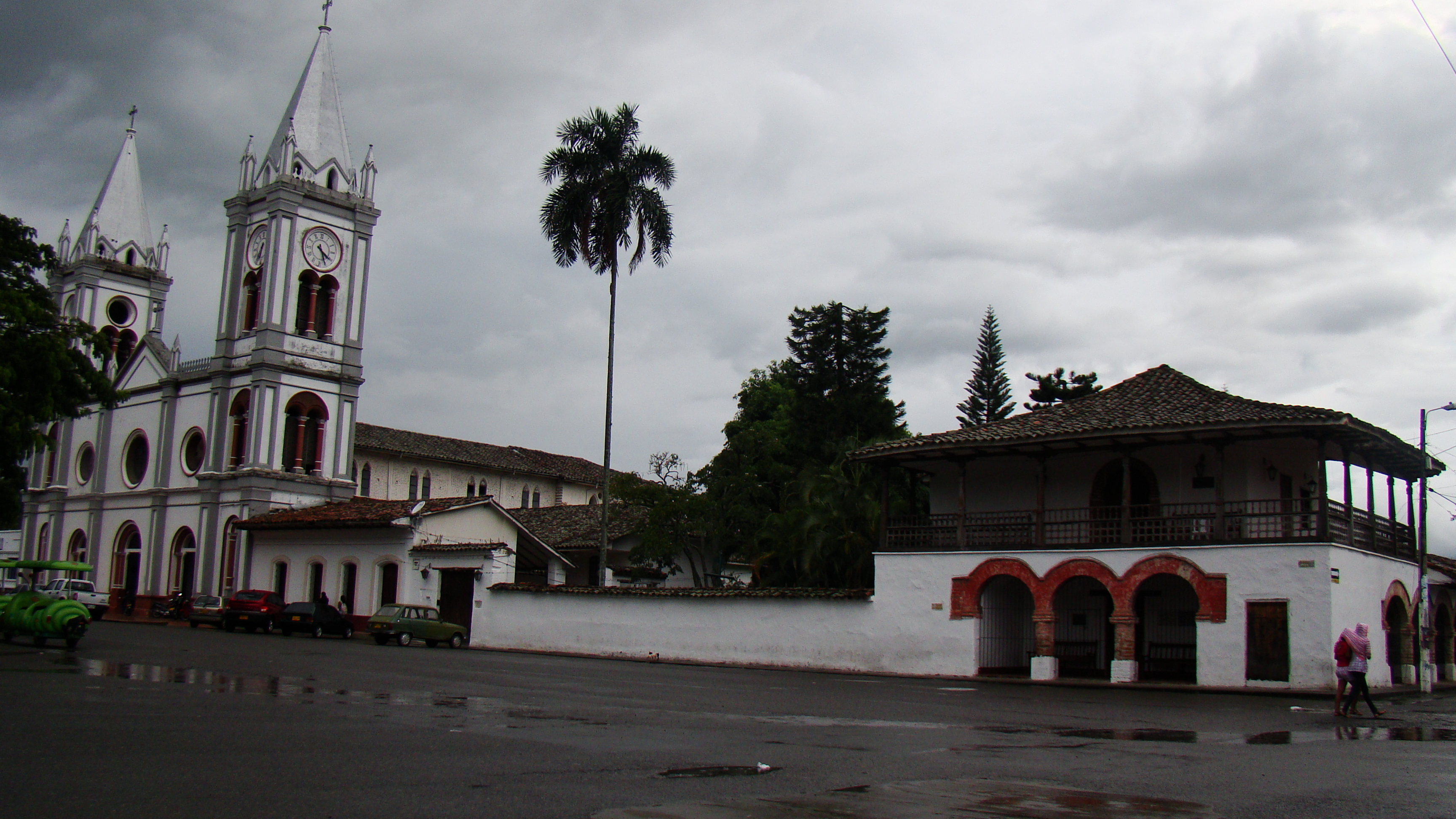 Sector Antiguo de la ciudad de El Cerrito Cerrito